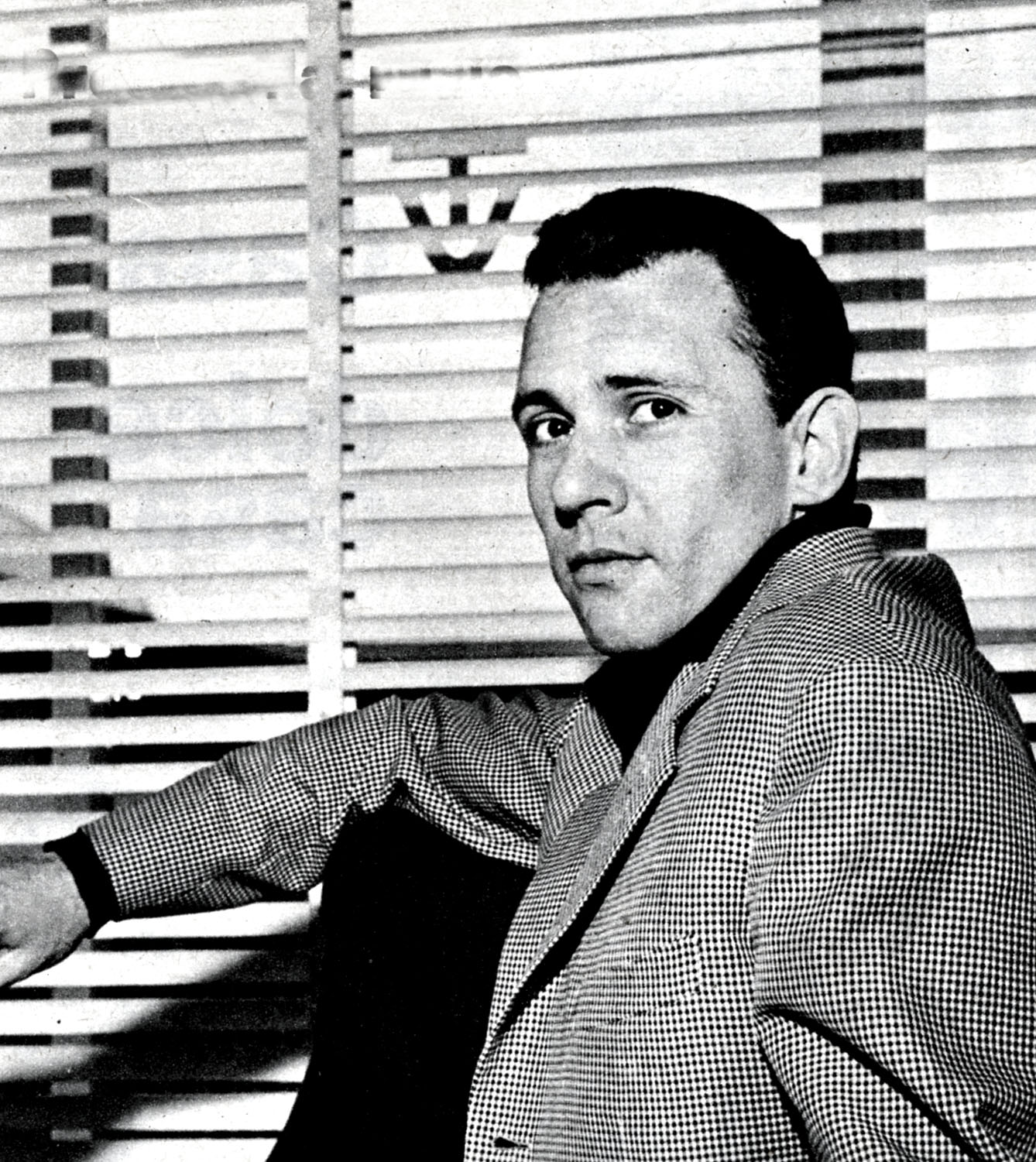 photo from magazine Radiocorriere (1961)